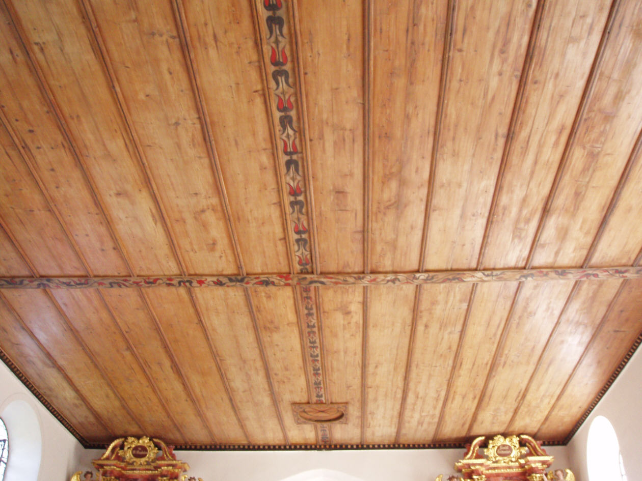 Decke der Burgkirche Schöllang